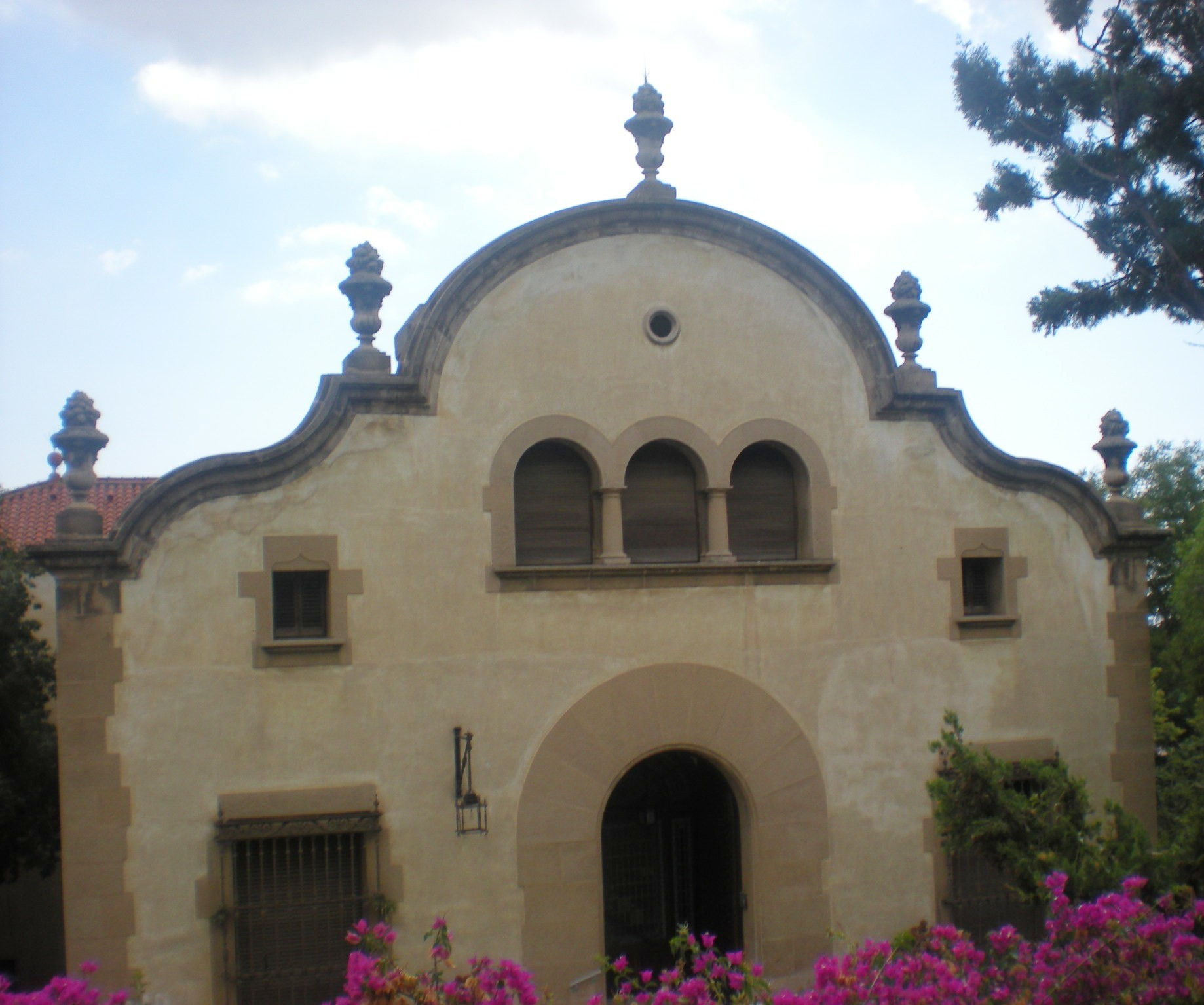 Antic Institut Ravetllat-Pla, Horta-Guinardó, Barcelona.